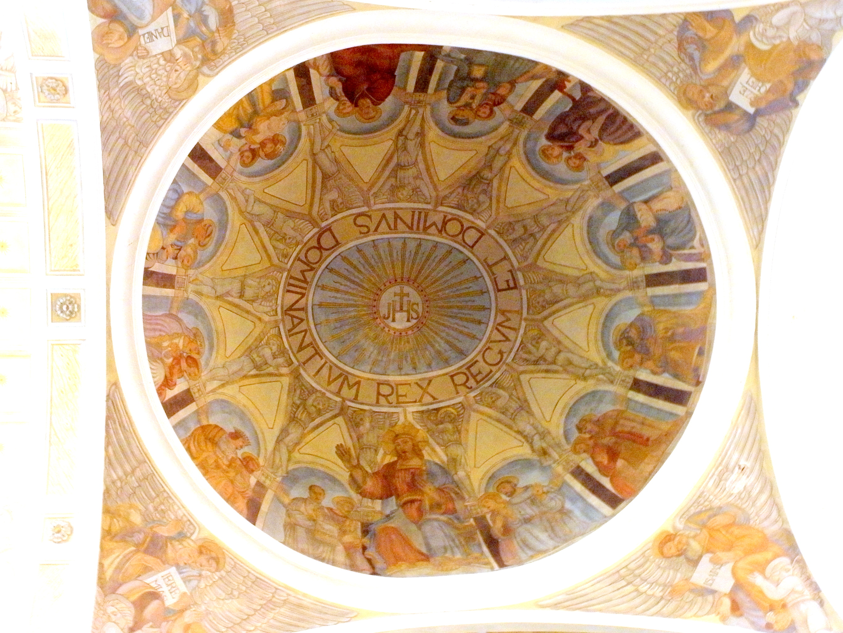 Agna, chiesa parrocchiale di San Giovanni Battista: interno, gli affreschi che decorano il cupola sopra l'altare maggiore.